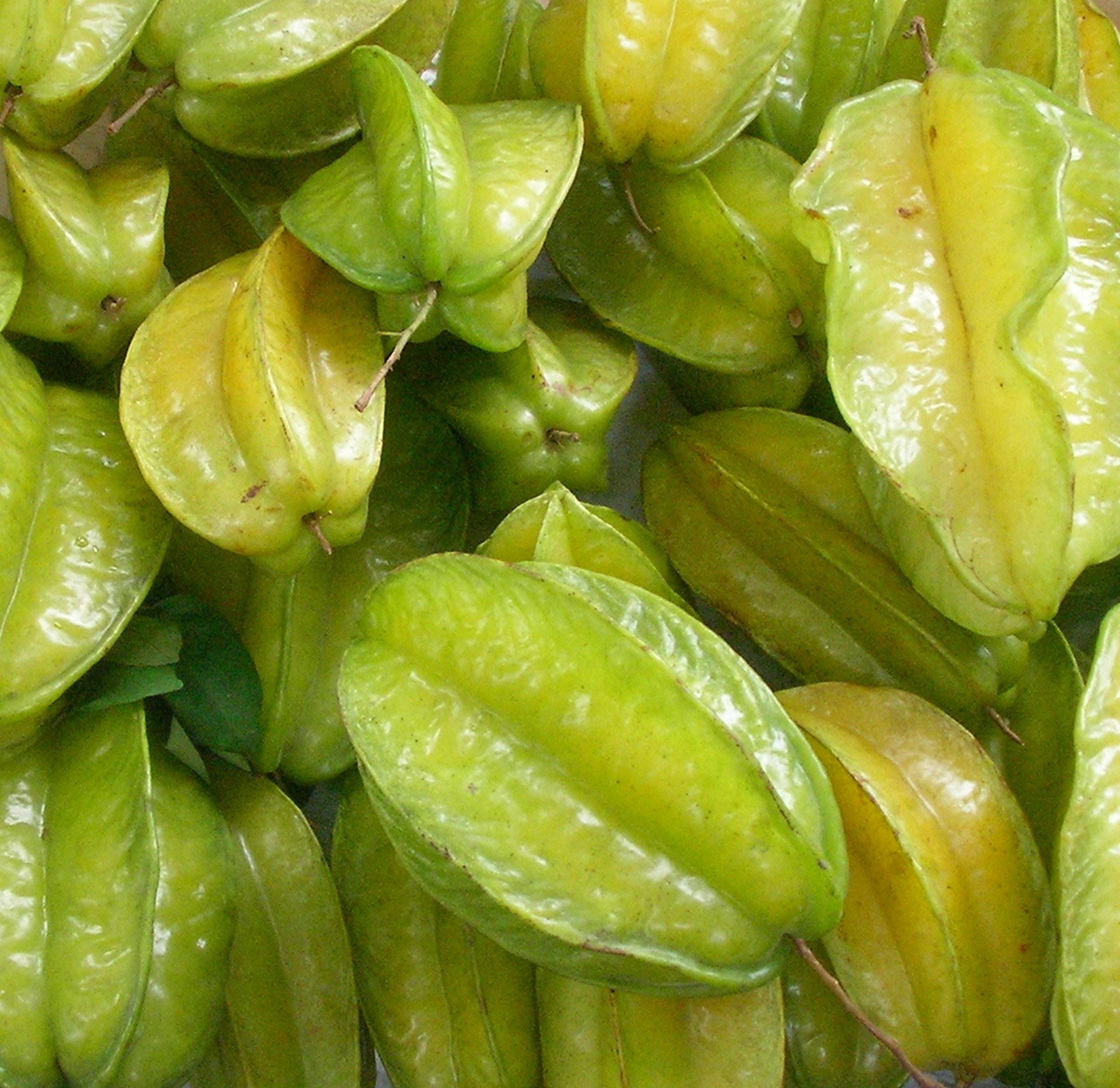 Star fruit (Averrhoa carambola).